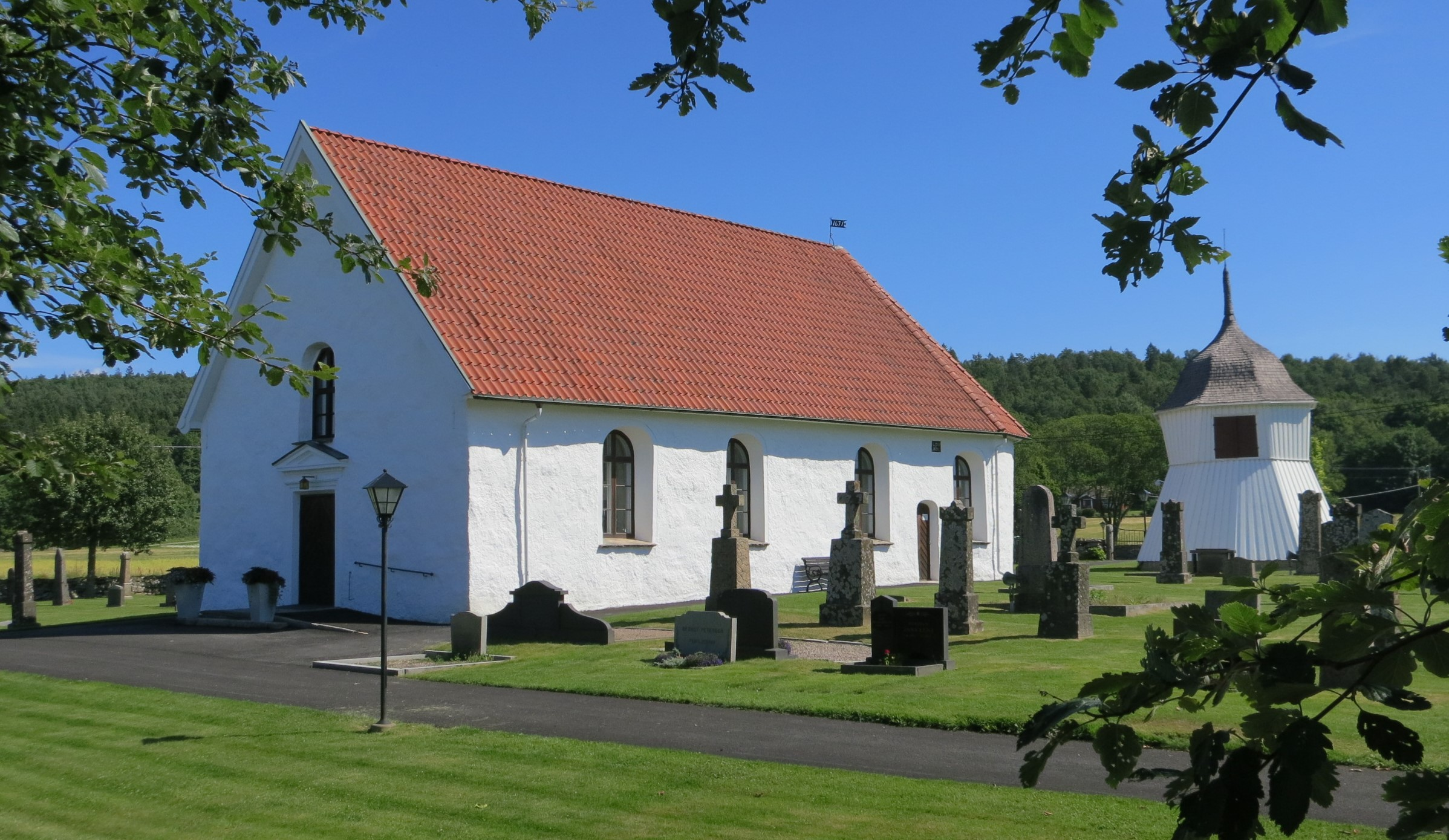 Stråvalla kyrka